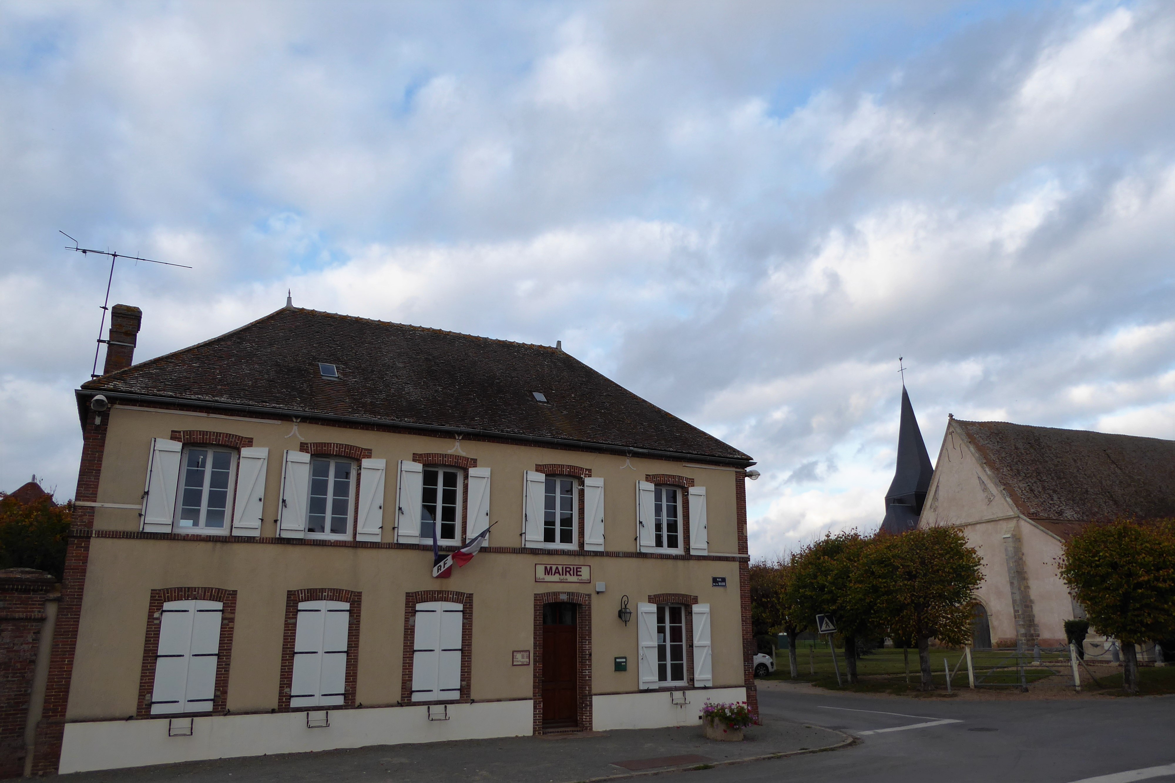 mairie et église Saint-Pierre, Marville-Moutiers-Brûlé, Eure-et-Loir, France.